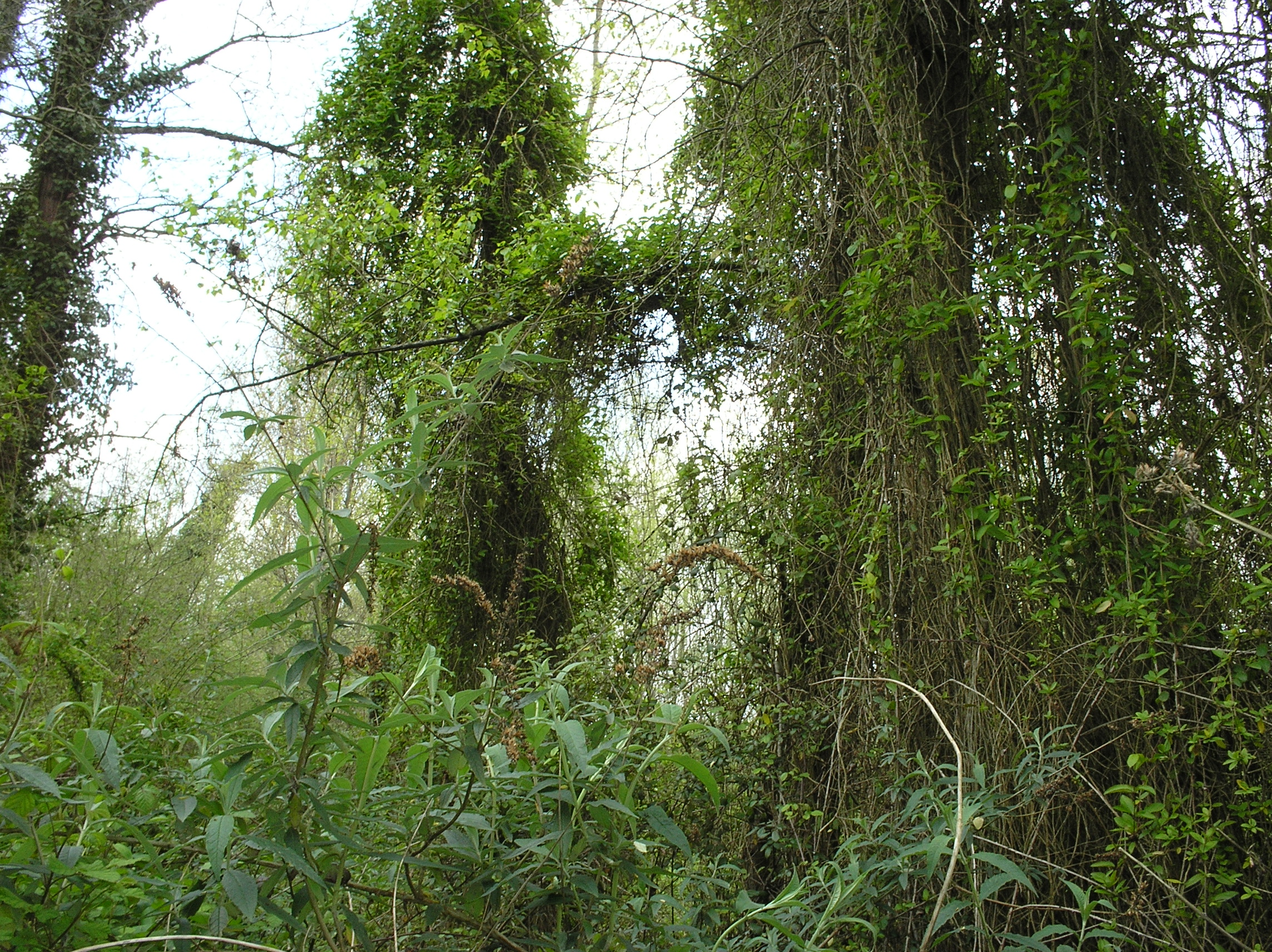 Lianes (clématites) recouvrant des arbres